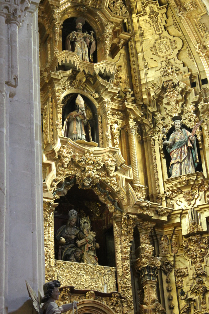 Iglesia de San Dionisio, Jerez de la Frontera (Andalucía, España)